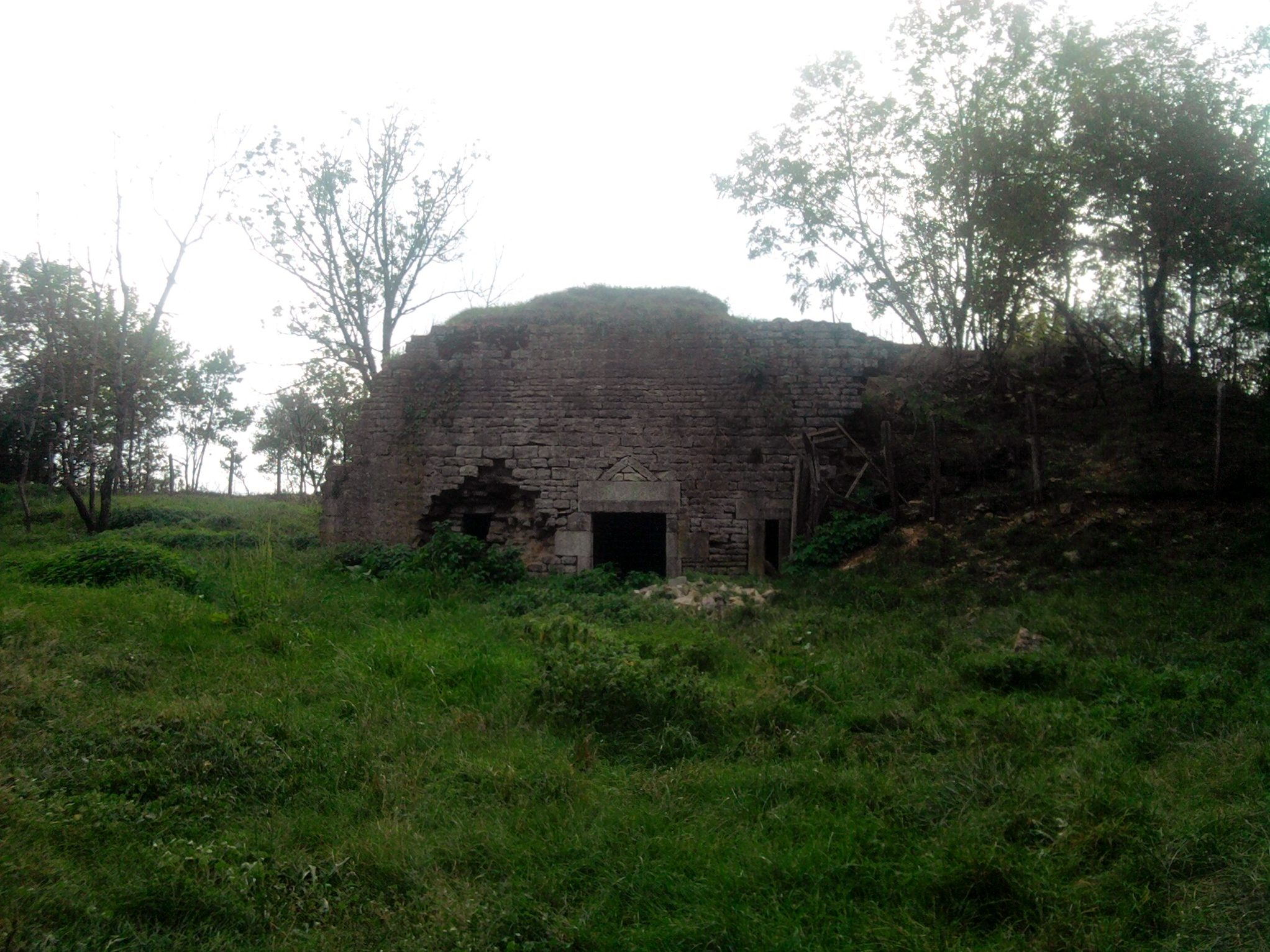 Facade principale du fort de Rosemont à Besançon.